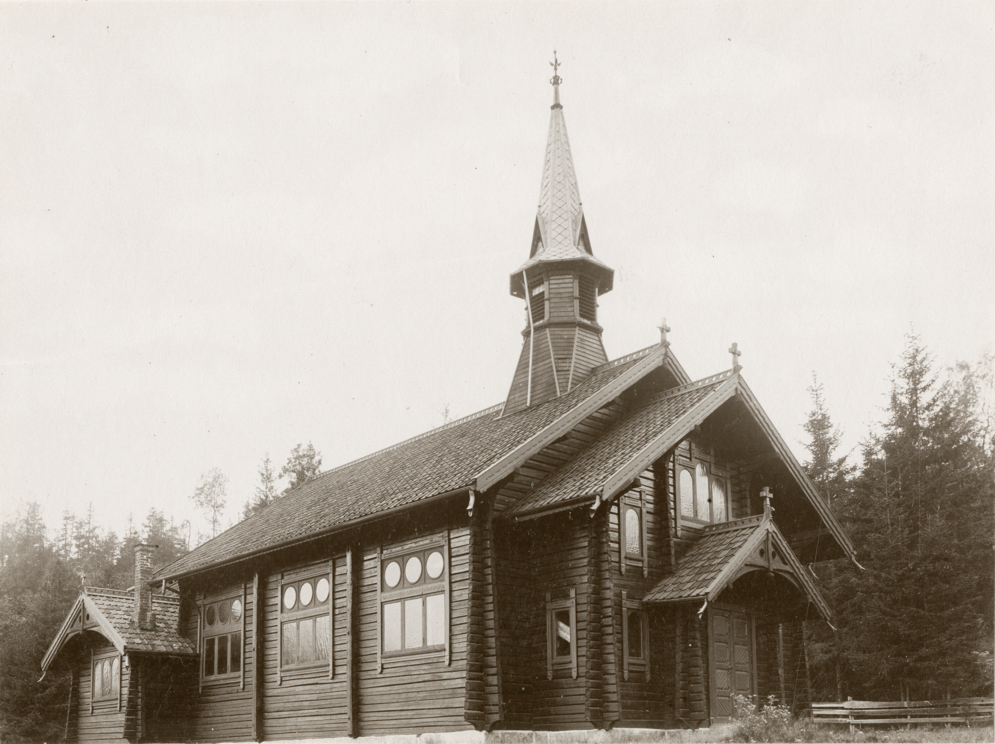 Filtvet kirke i Hurum, Buskerud This image on crowdsourcing geotagging platform Fotodugnad